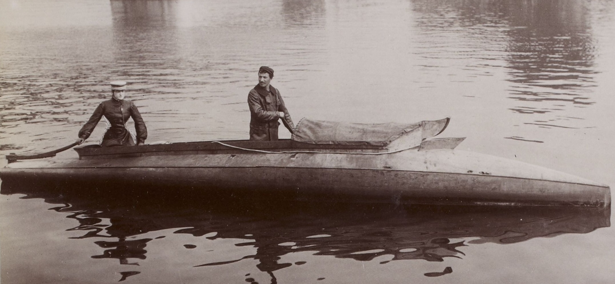 [Collection Jules Beau. Photographie sportive] : T. 28. AnnÃ©e 1904 / Jules Beau : F. 5. [Canots automobiles, Juvisy, 25 septembre 1904]